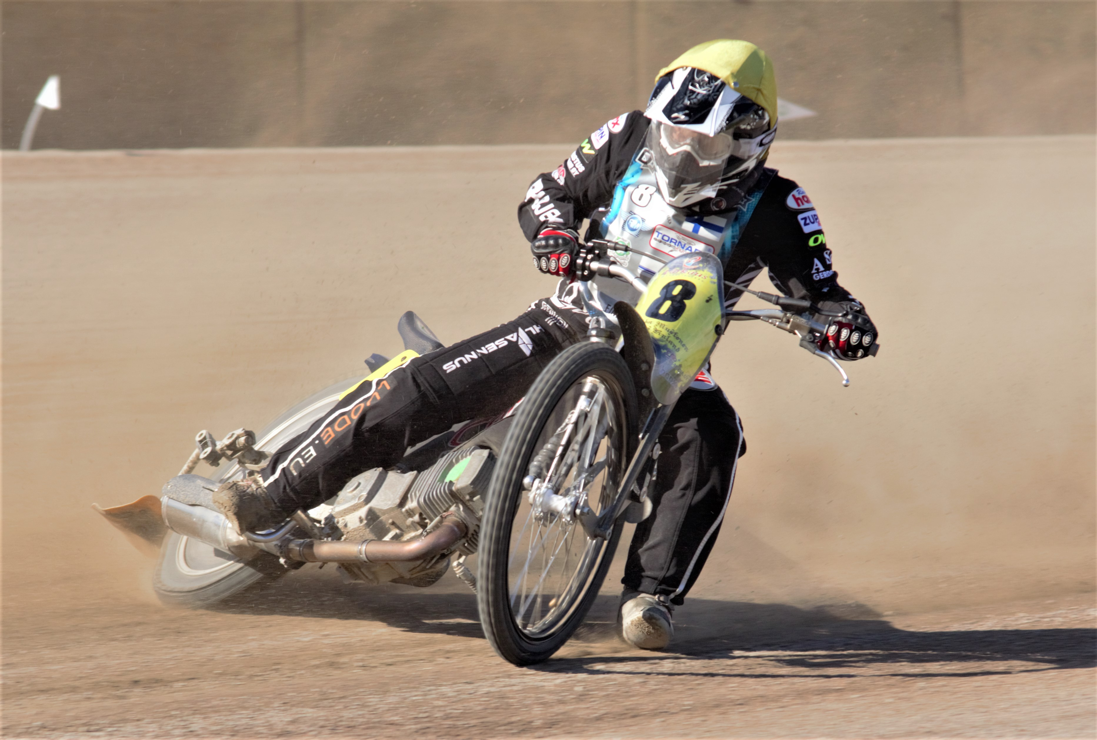 Mustosen tyyliä Forssan MM-maaradalla 2013.